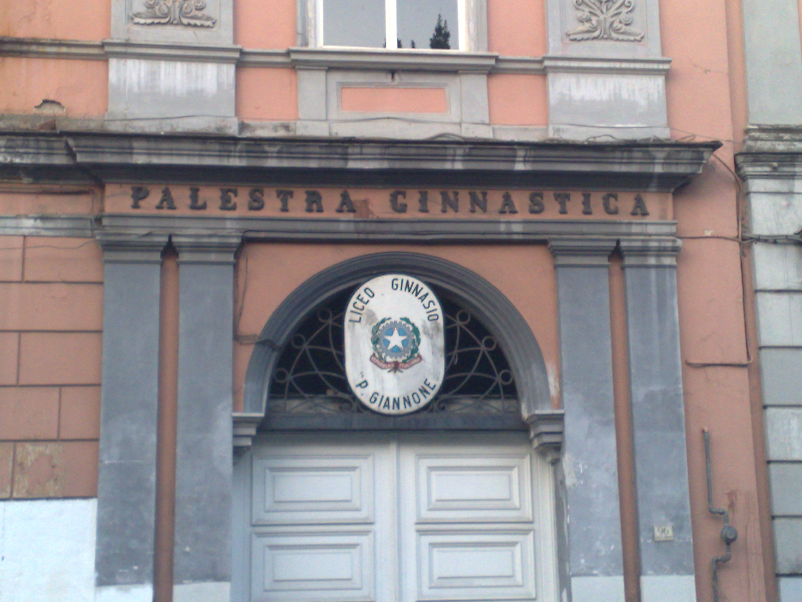 La foto della tabella del Liceo Giannone di Caserta.